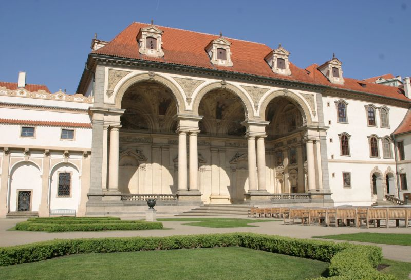 Salla Terrena du Senat, sis dans le palais Waldstein a Mala Strana.